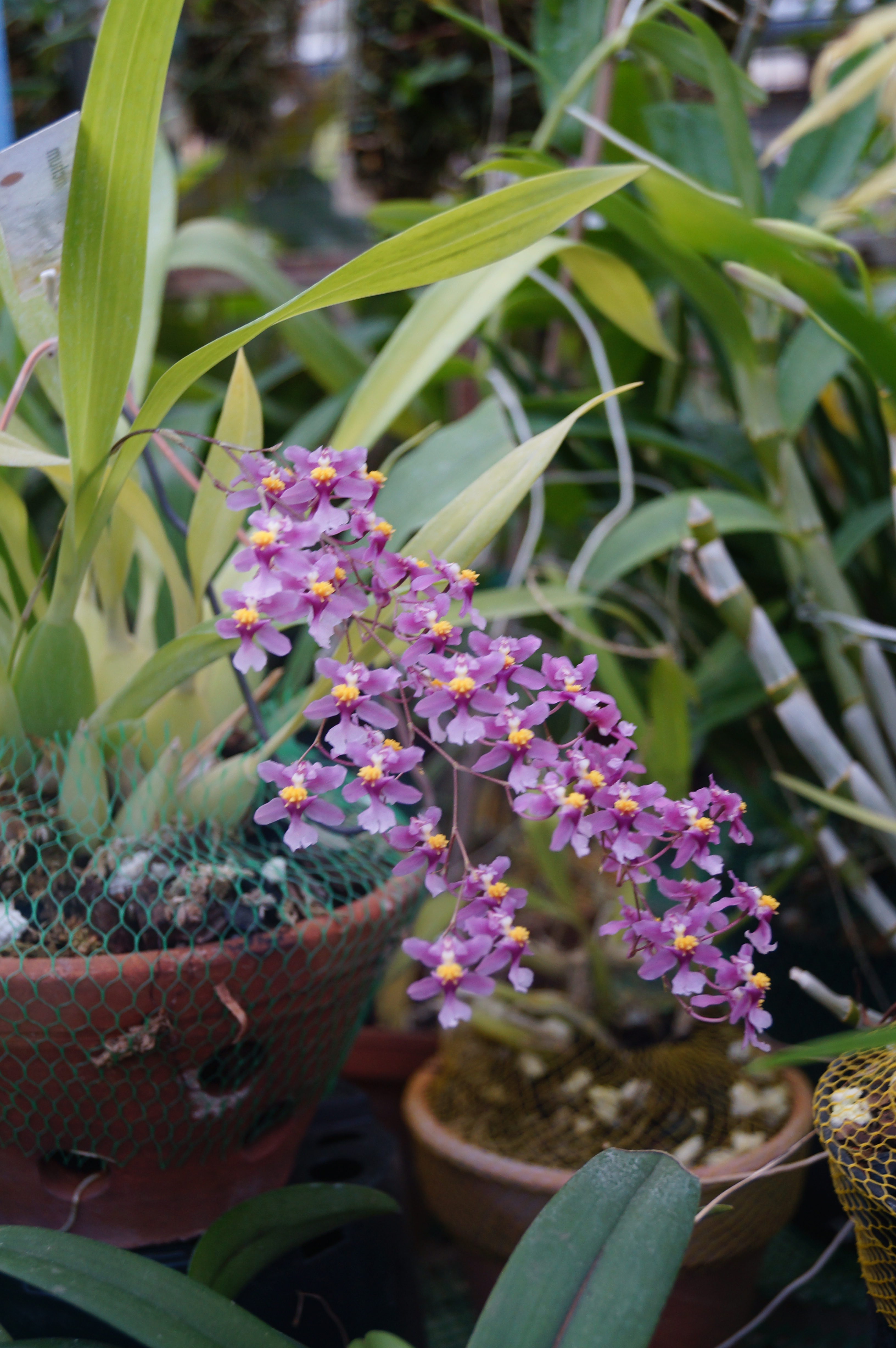 Ogród Botaniczny UJ w Krakowie